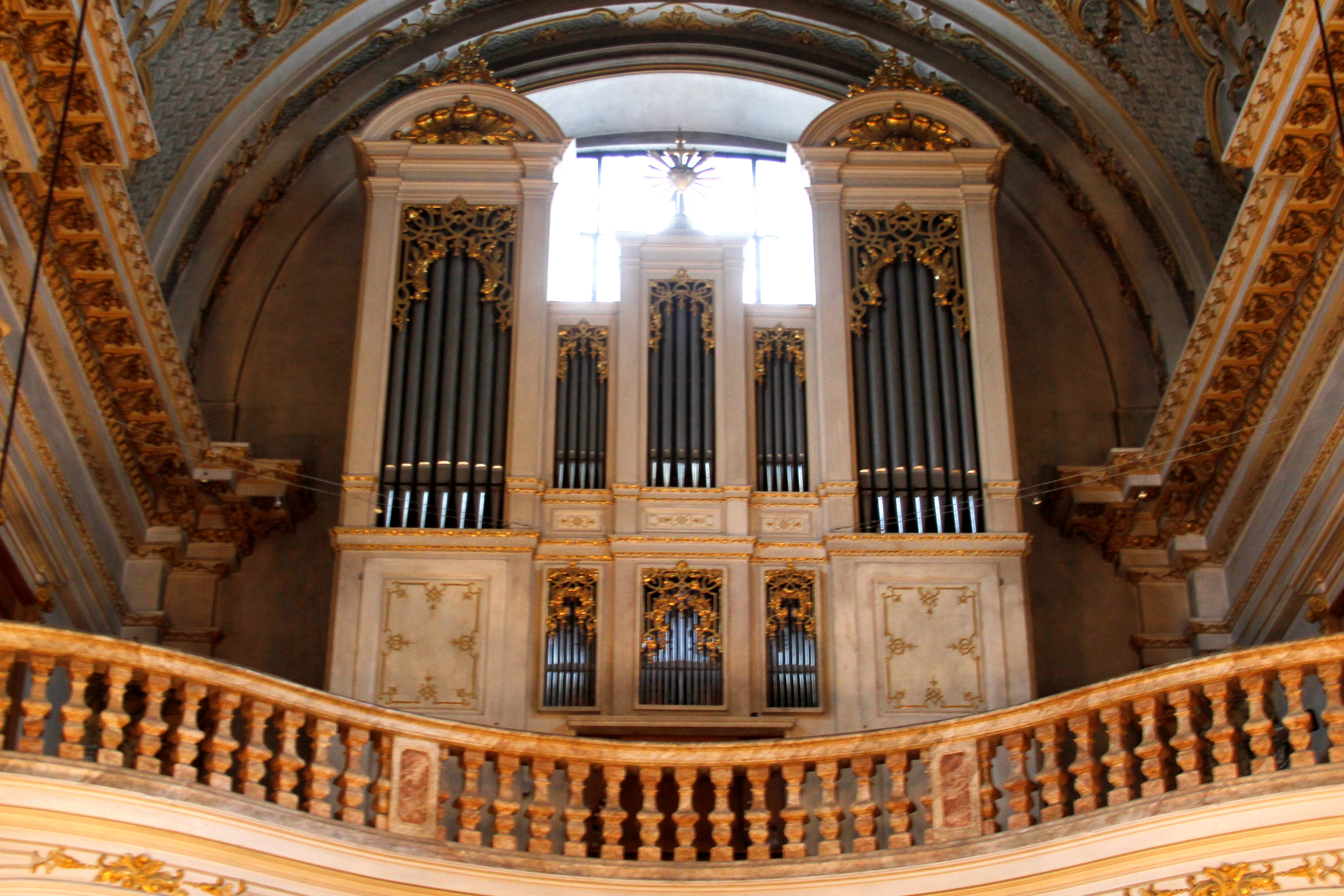 Damenstiftskirche Sankt Anna - Munich - Germany